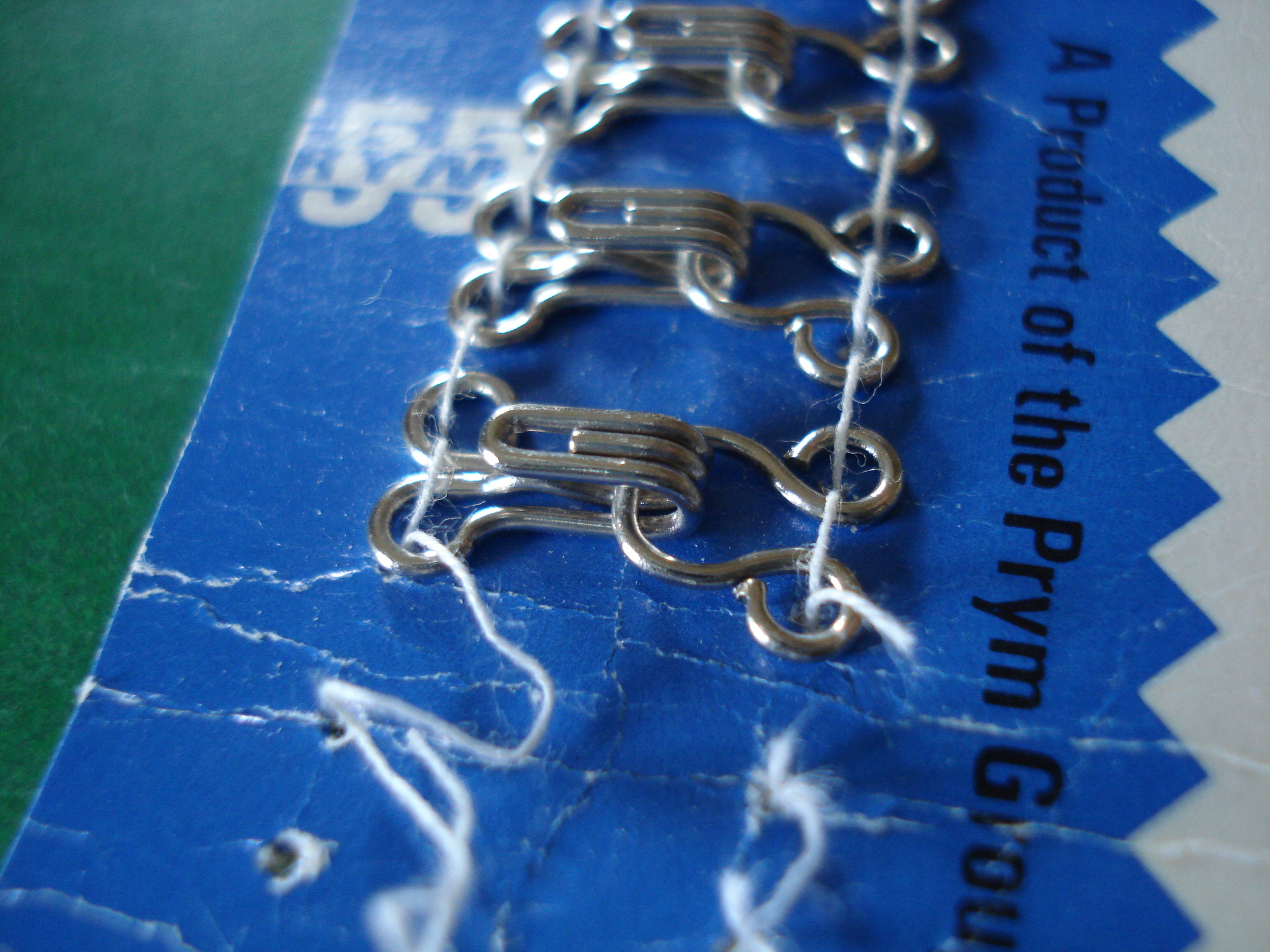 Agrafoj